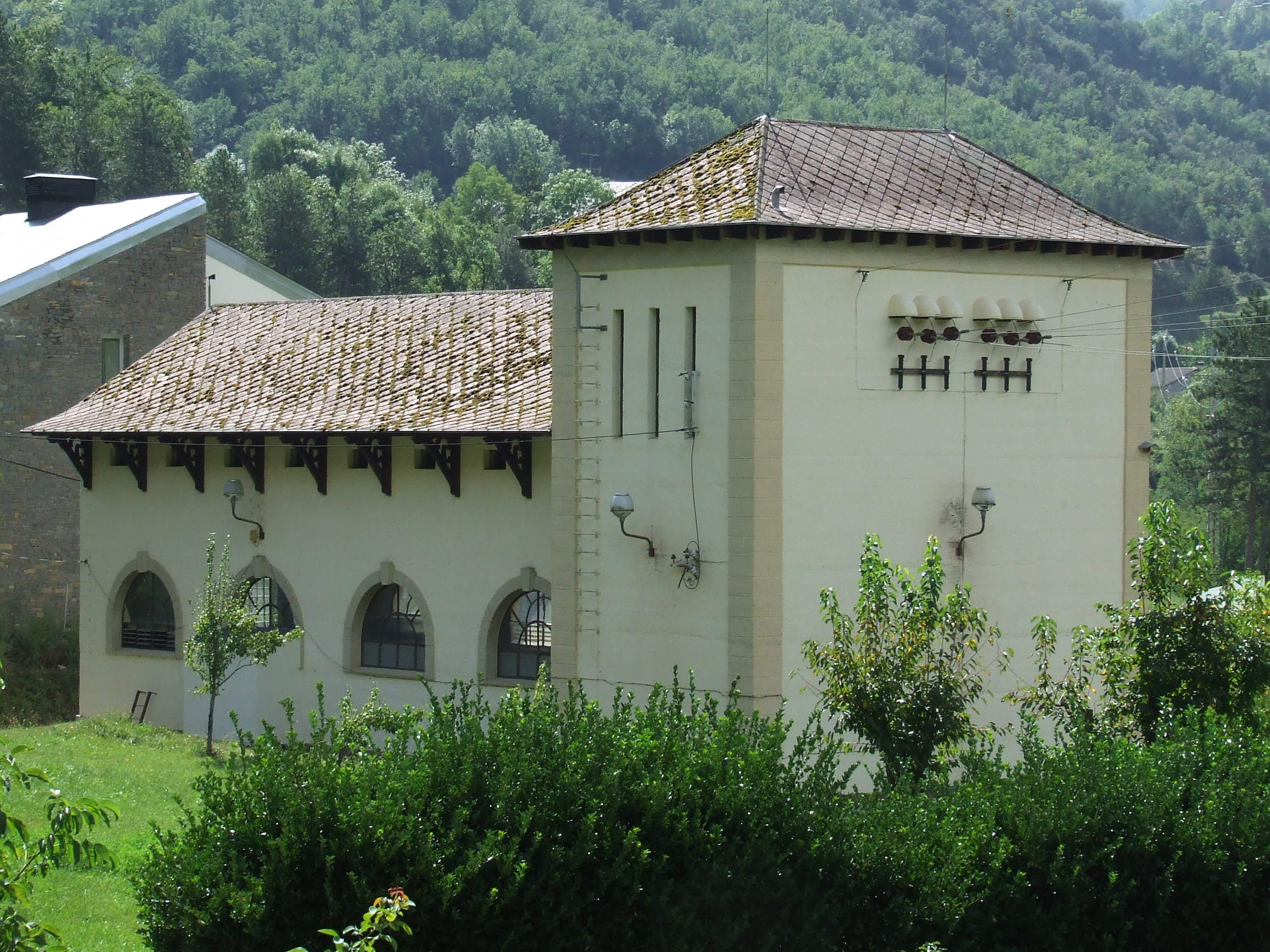 La Central Elèctrica de la Plana de Mont-ros (la Torre de Cabdella, Pallars Jussà)